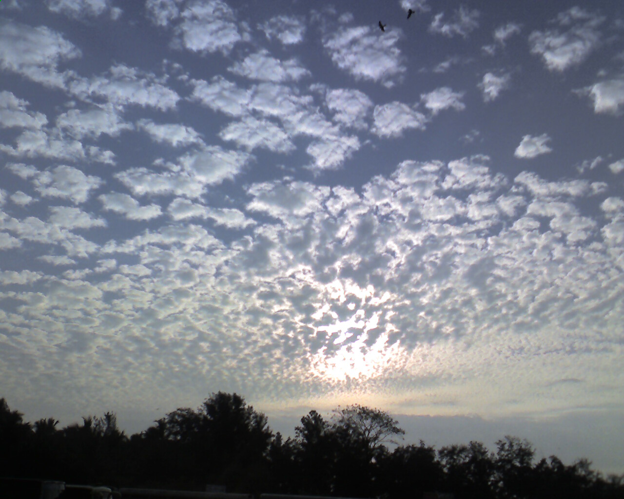 An evening sky in Virar, Maharashtra. India